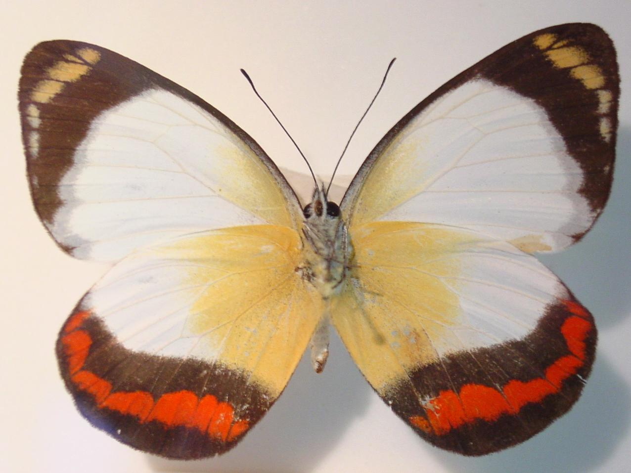 self made. Species: Delias mysis